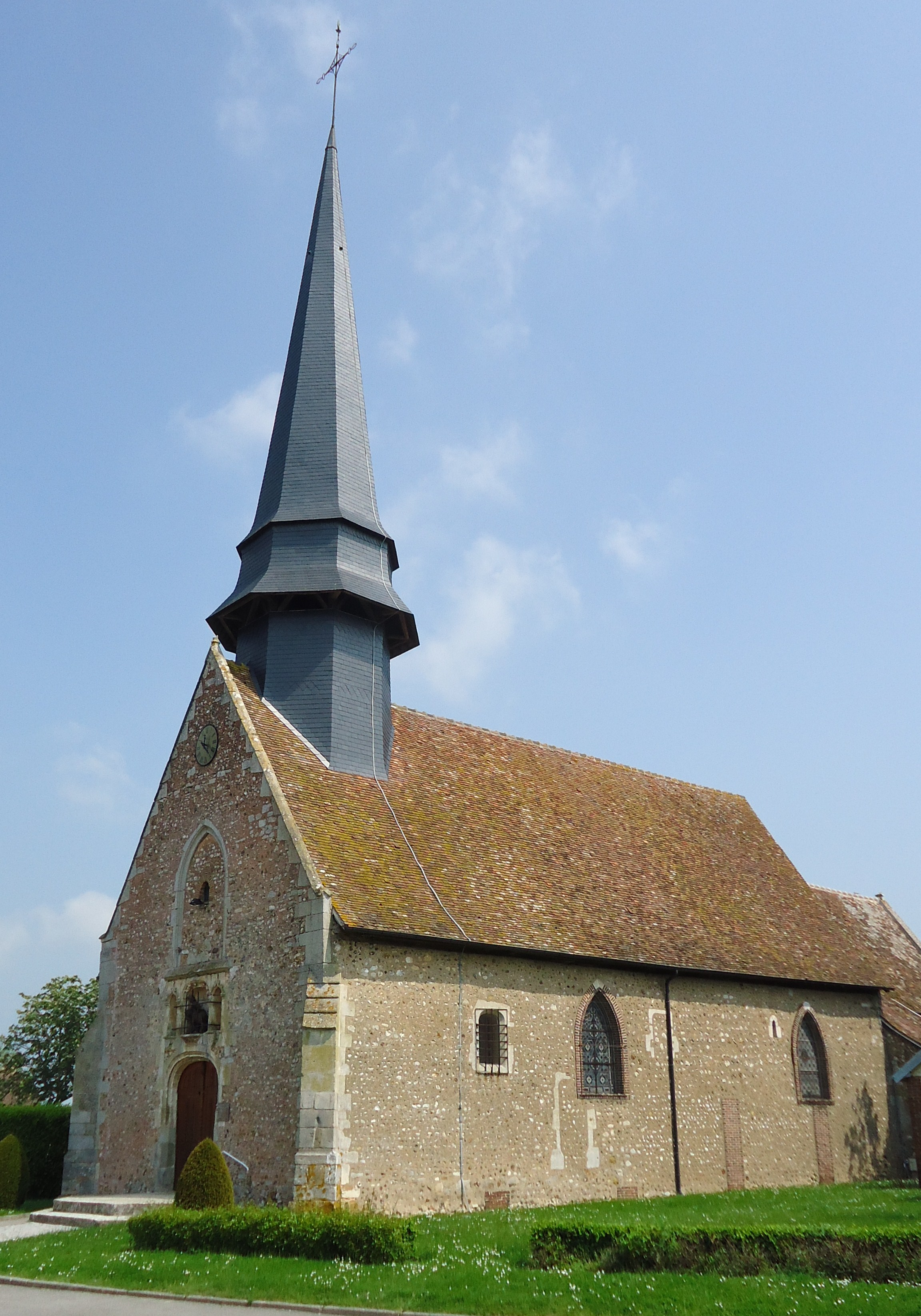 GRANDVILLIERS - Eglise Saint-Martin, XVIe (ISMH)